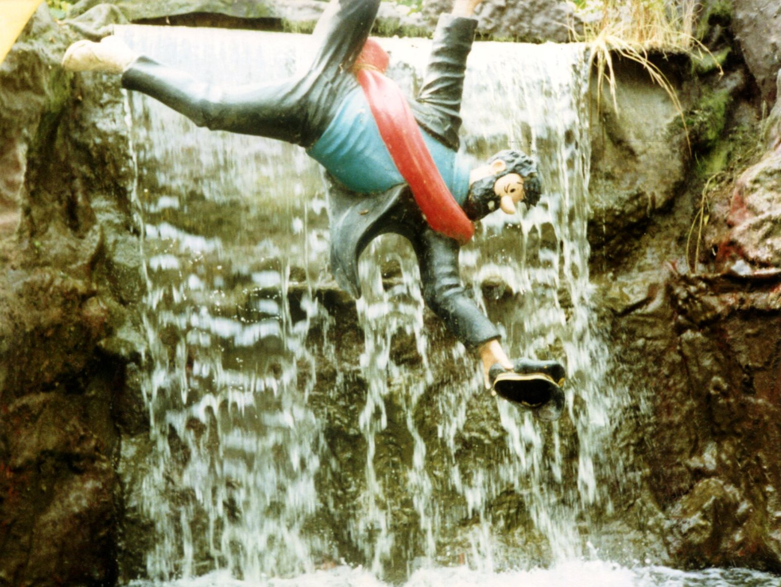 WalibiHaddock